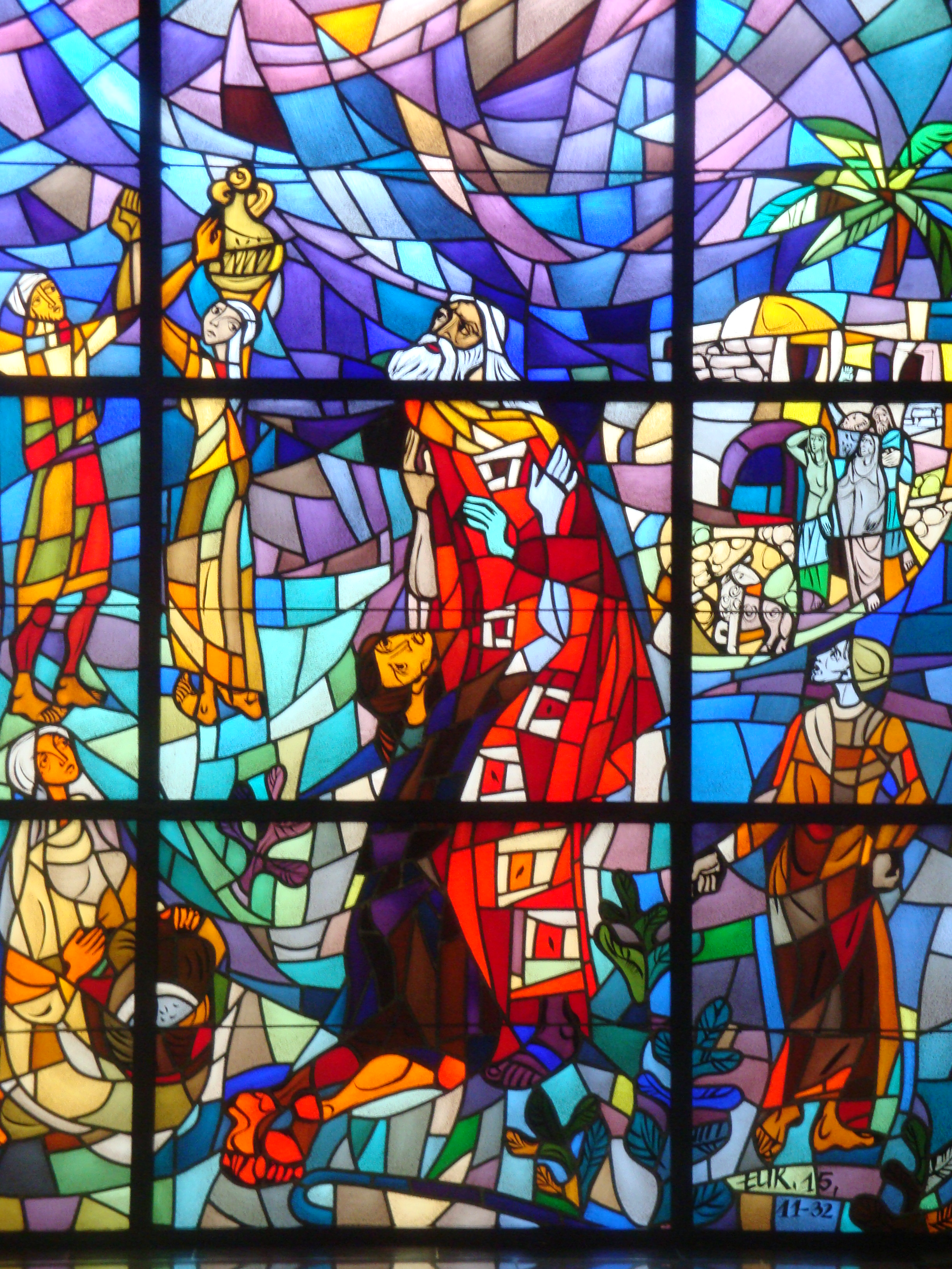 Kościół Matki Bożej Nieustającej Pomocy w Tarnobrzegu-Serbinowie